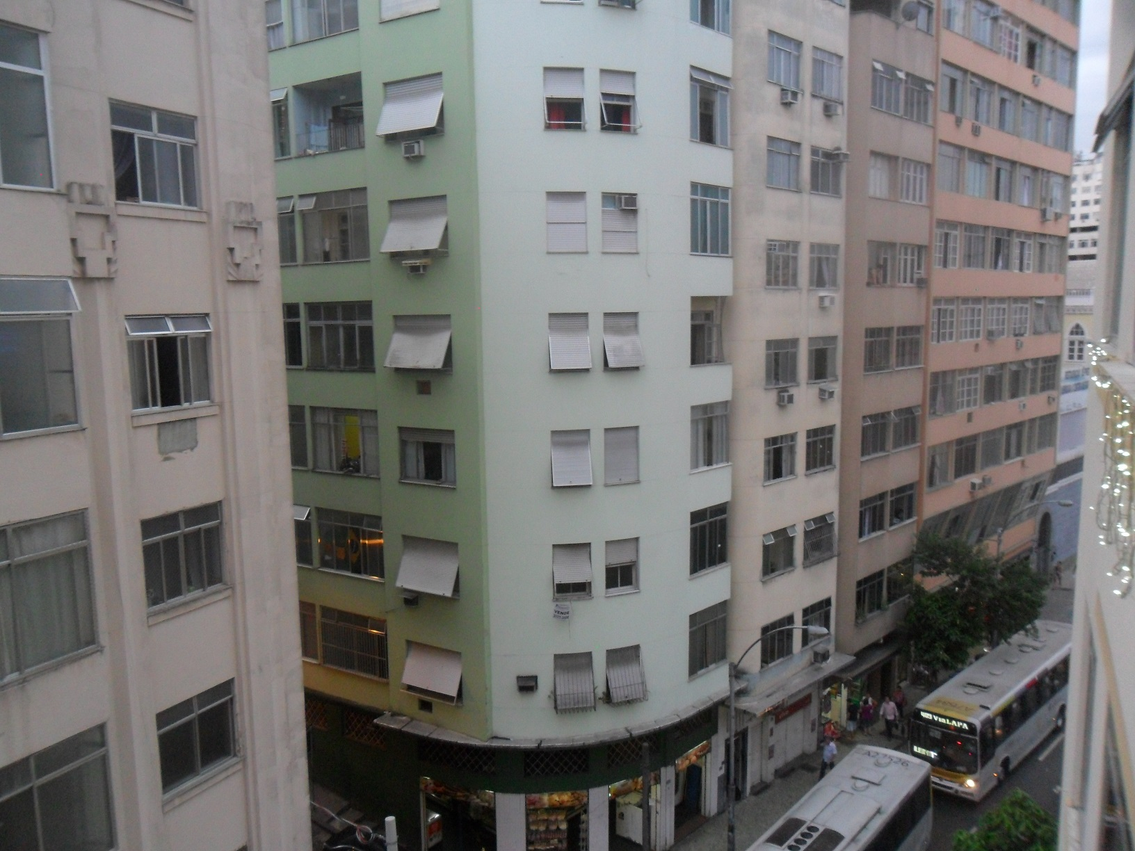 Bairro de Fátima